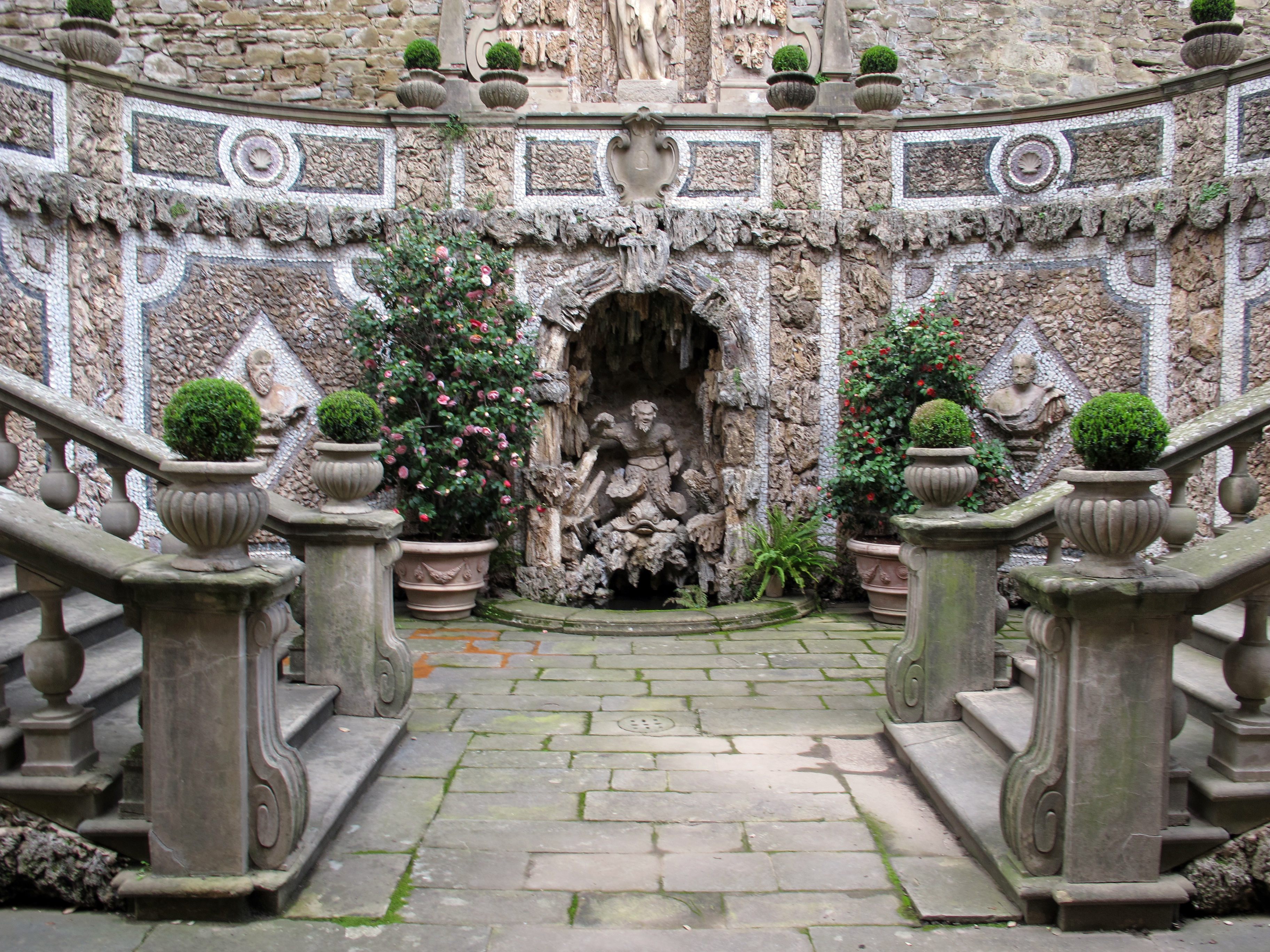 Le balze, ninfeo